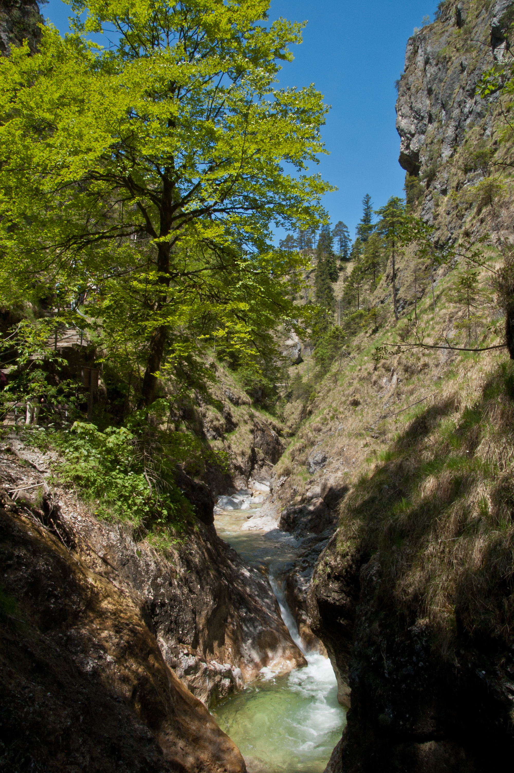 Im Mittelteil der Almbachklamm, beim markanten Baum im Bild handelt es sich um eine Rotbuche